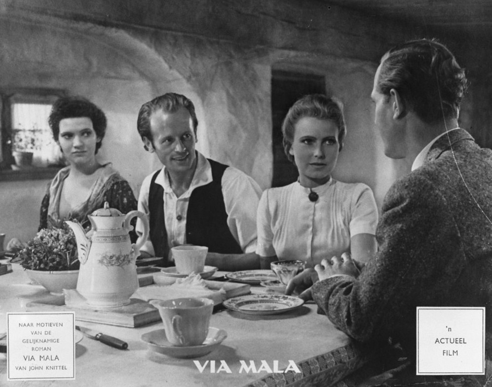 Actueel film repros Via Mala: Renate Mannhardt, Malte Jaeger, Karin Hardt, Viktor Staal